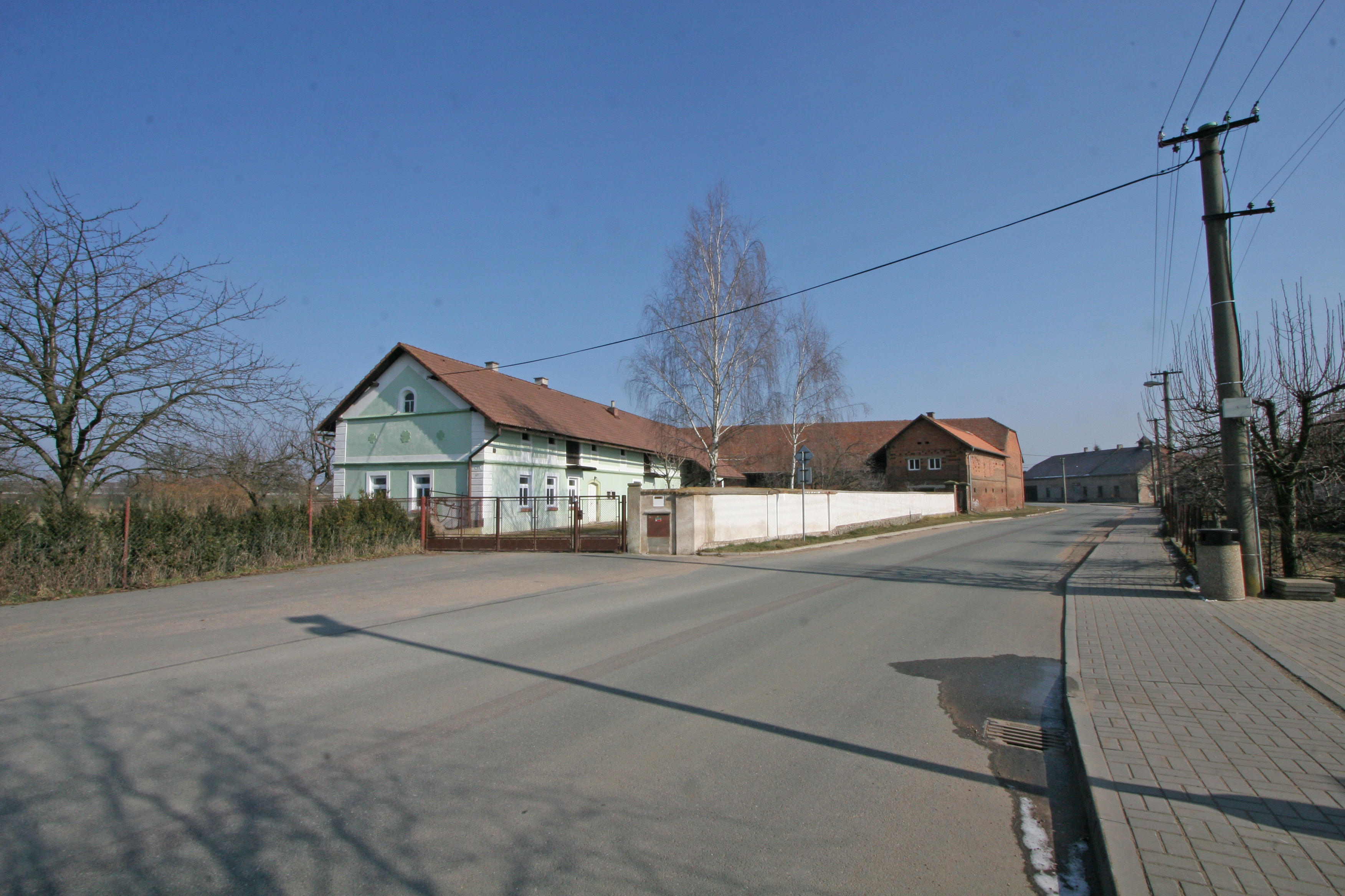 Krásnice čp 11